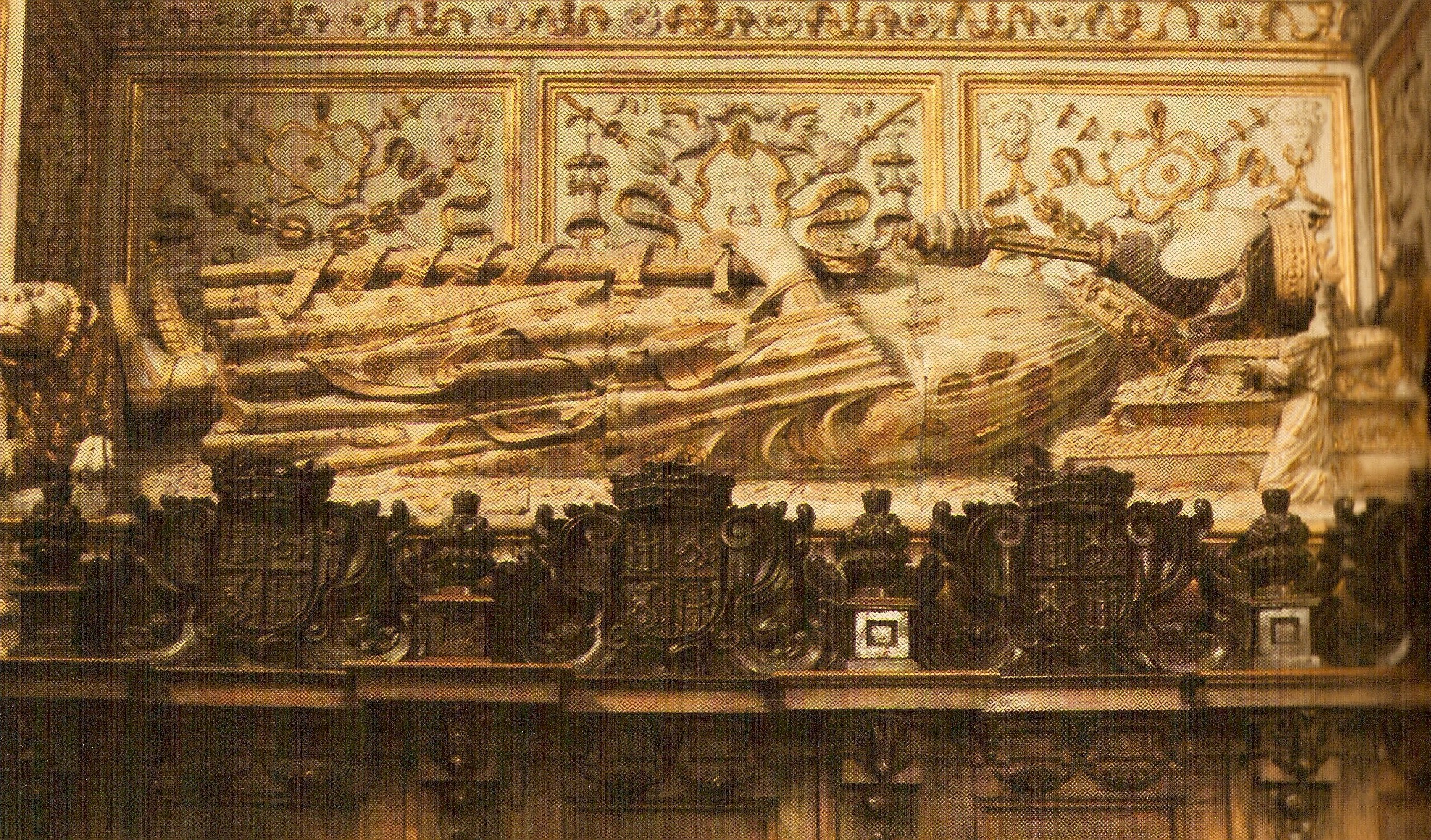 Sepulcro del rey Enrique II de Castilla (1334-1379). Se encuentra en la capilla de los Reyes Nuevos de la catedral de Toledo.